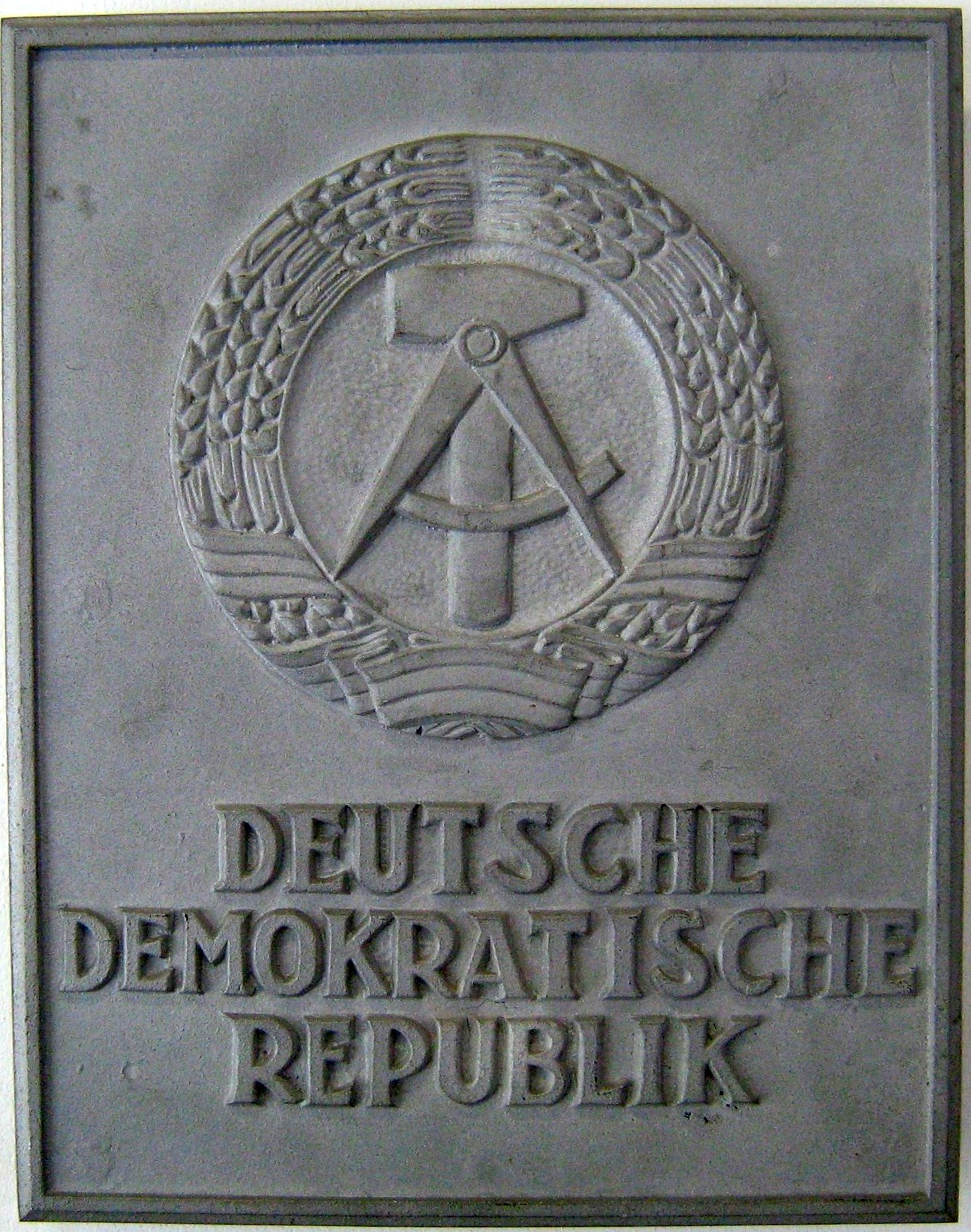 DDR-Schild einer Grenzsäule